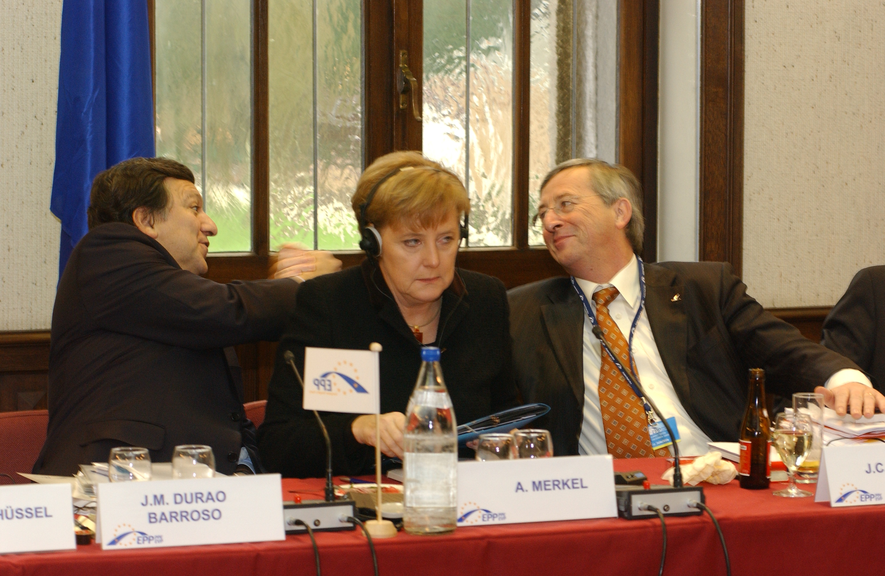 EPP Summit 15 December 2005